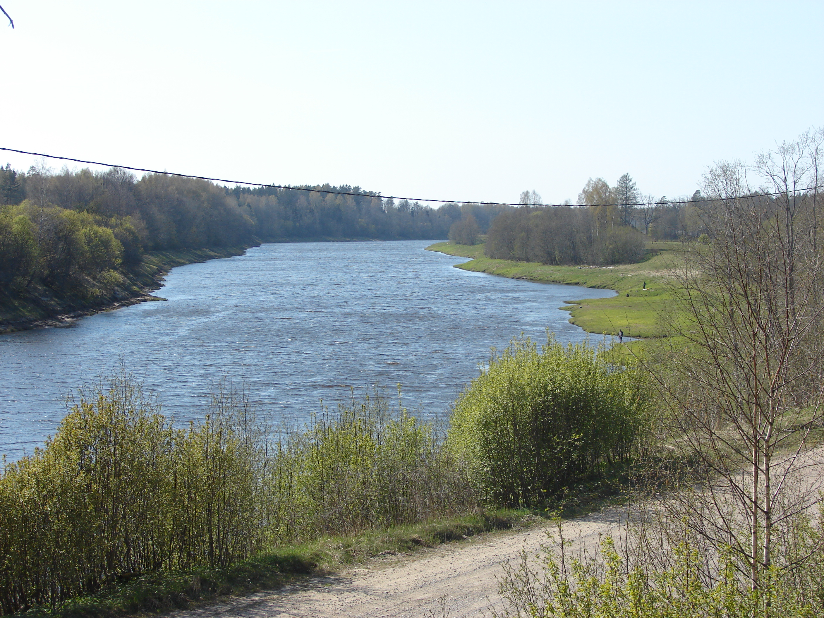 Venta, Zlēku pagasts, Ventspils novads, Latvia